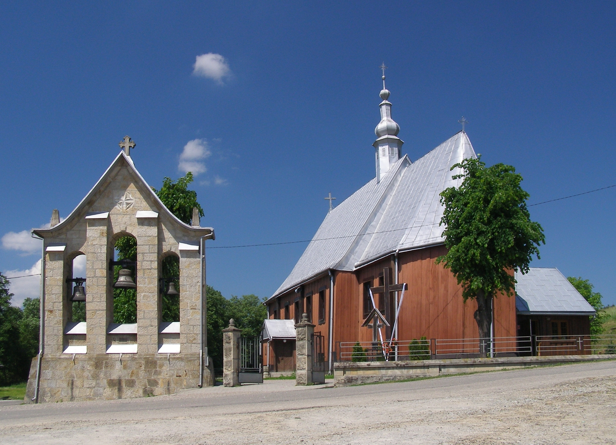 wieś Żurowa